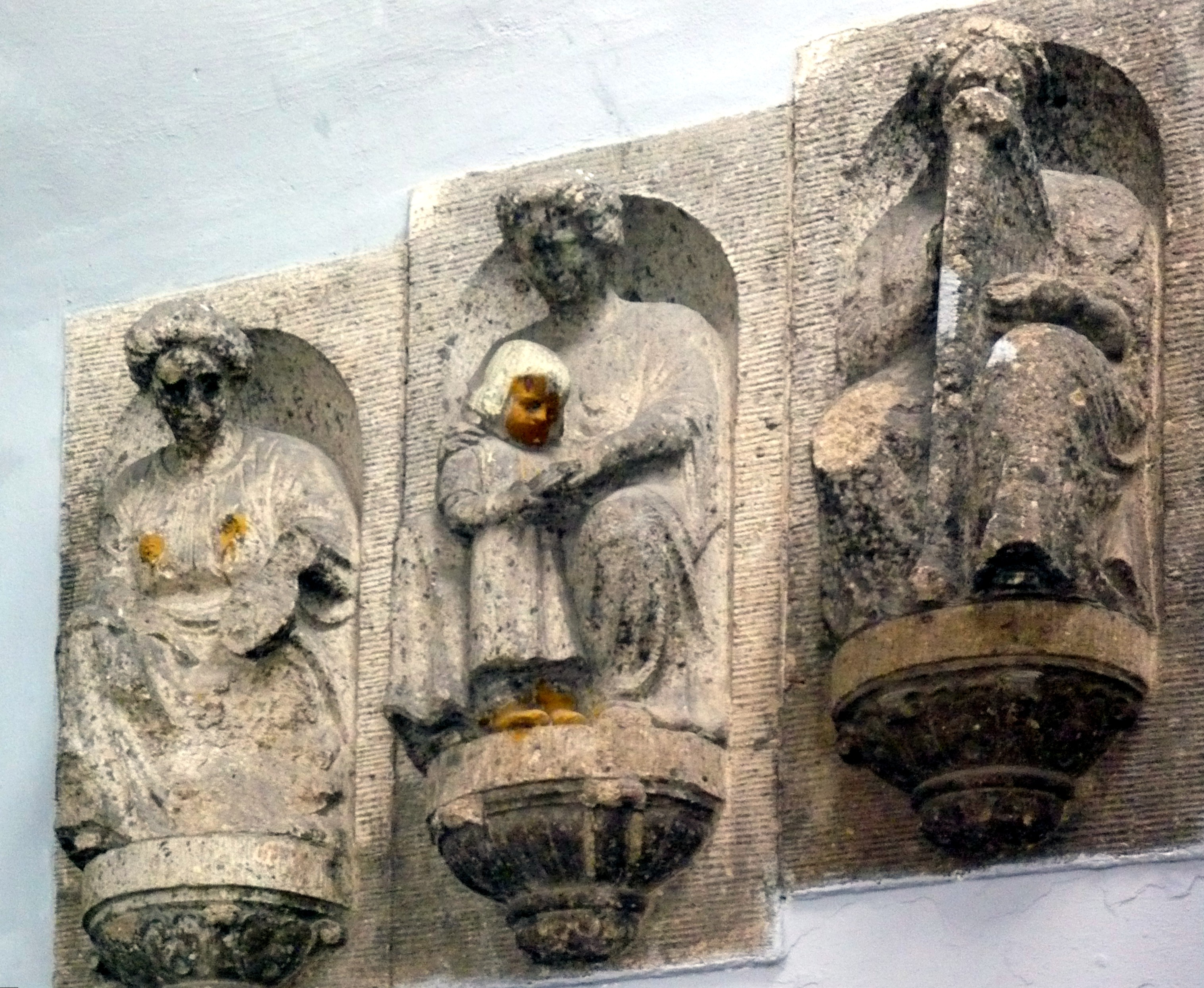 Berlin-Lichtenberg, eh. Cecilien-Lyzeum